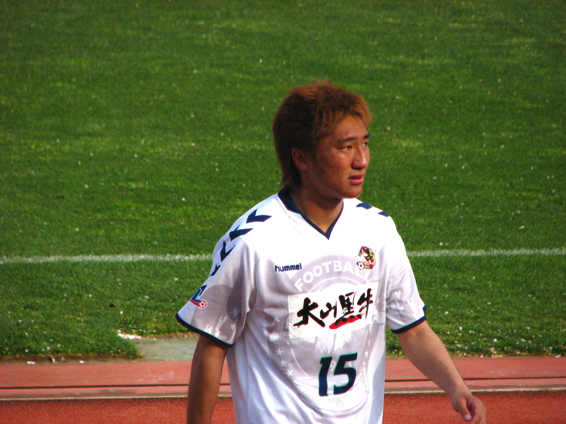 小澤竜己